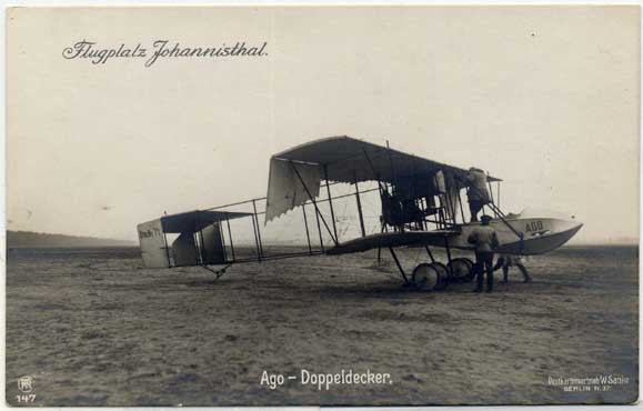 Ago Aufklärer, noch mit Gitterrumpf